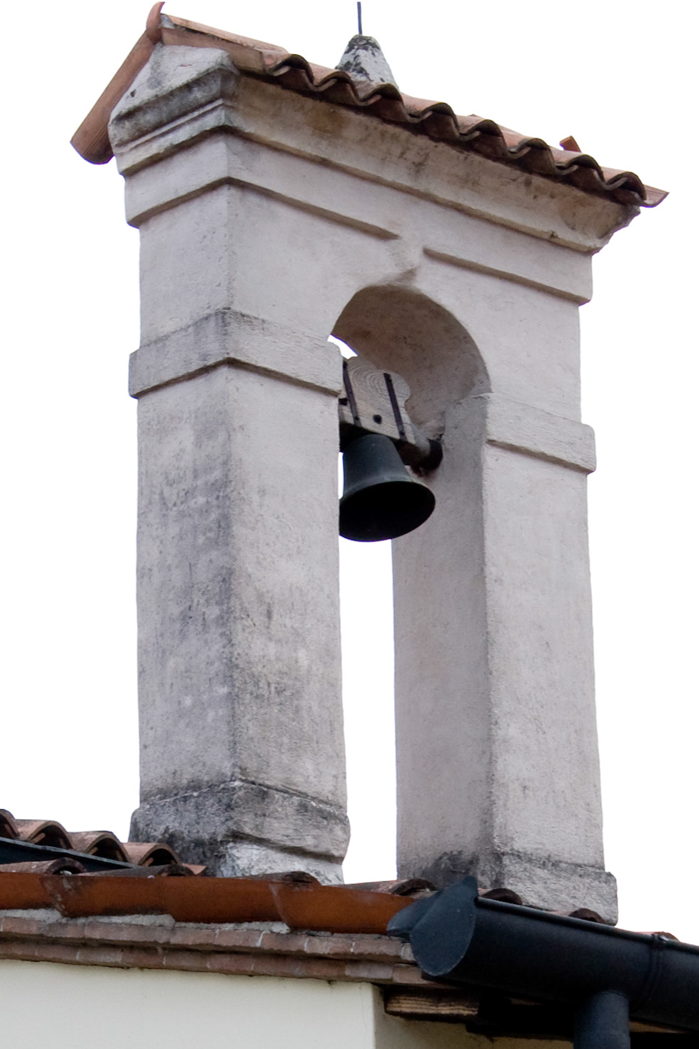 Vicenza Chiesa di Santa Caterina in Porto - campanile a vela